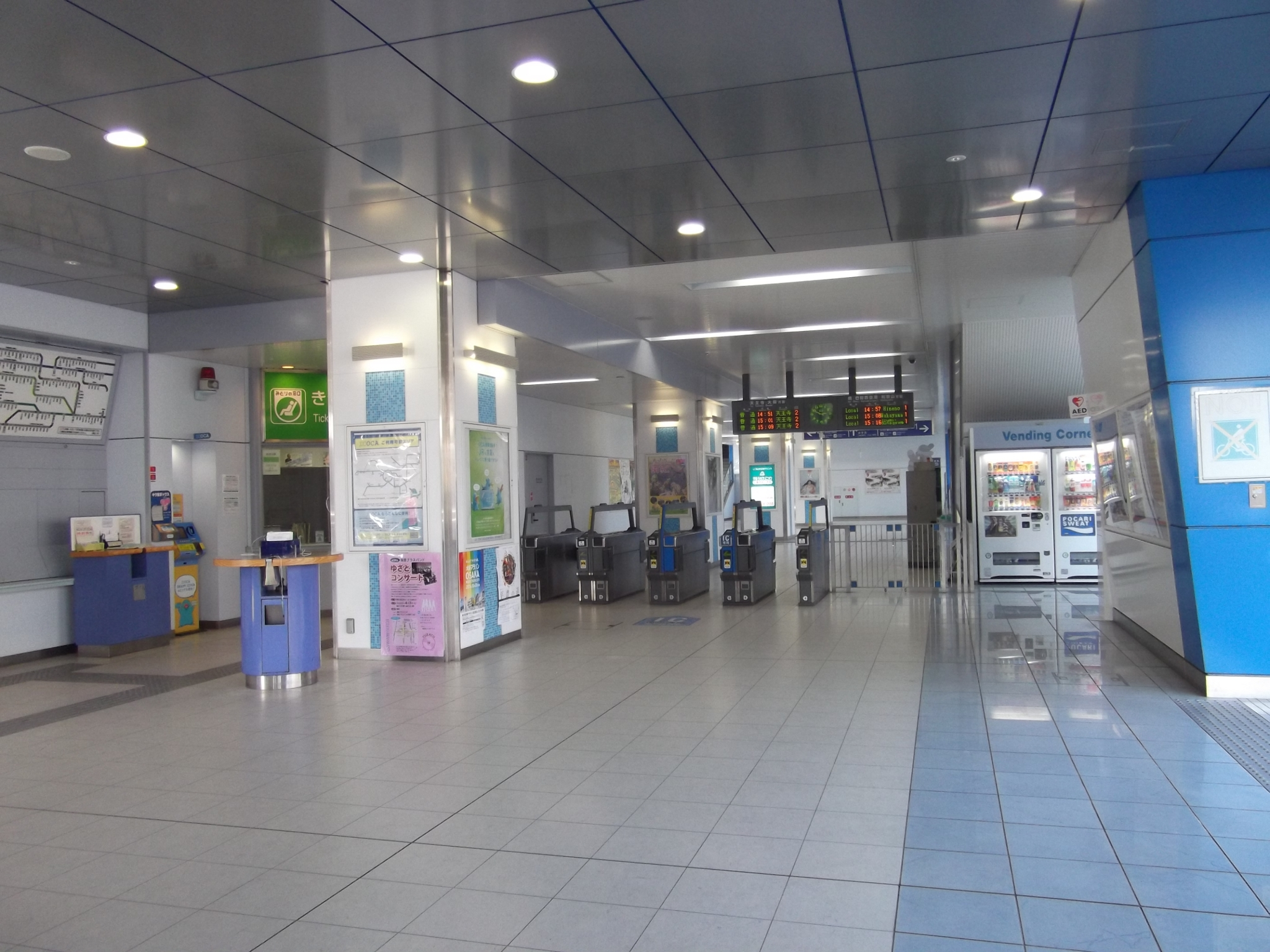 阪和線南田辺駅の改札口